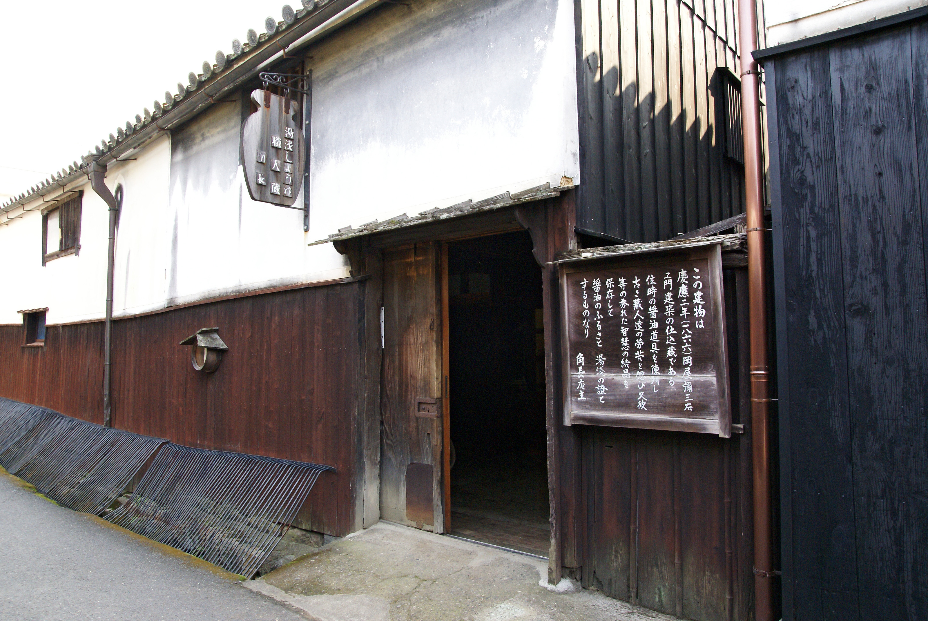 Yuasa in Yuasa, Wakayama, Japan